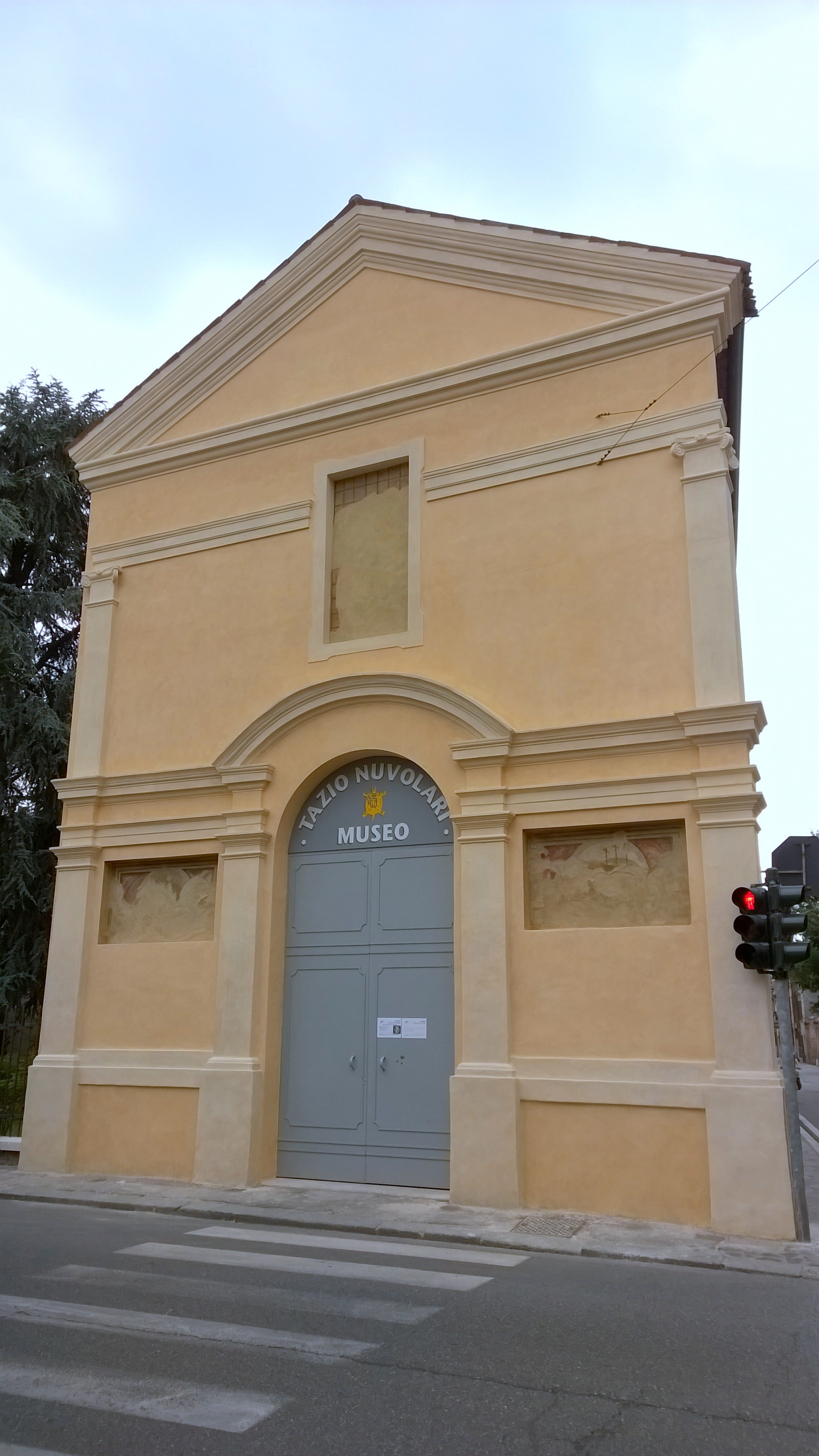 Museo dedicato al pilota automobilistico Tazio Nuvolari situato in Via Giulio Romano, angolo Via Nazario Sauro, a Mantova.